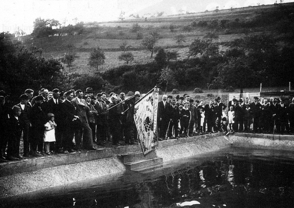 Einweihung der Badeanstalt Stromberg im Warmrother Grund am 4. Juni 1927, im Vordergrund wird die Fahne des TuS Stromberg 1892 e.V. emporgehalten.